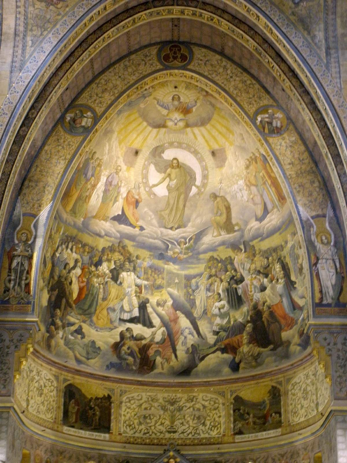 Basílica del Sagrado Corazón de Jesús (Gijón, Asturias)